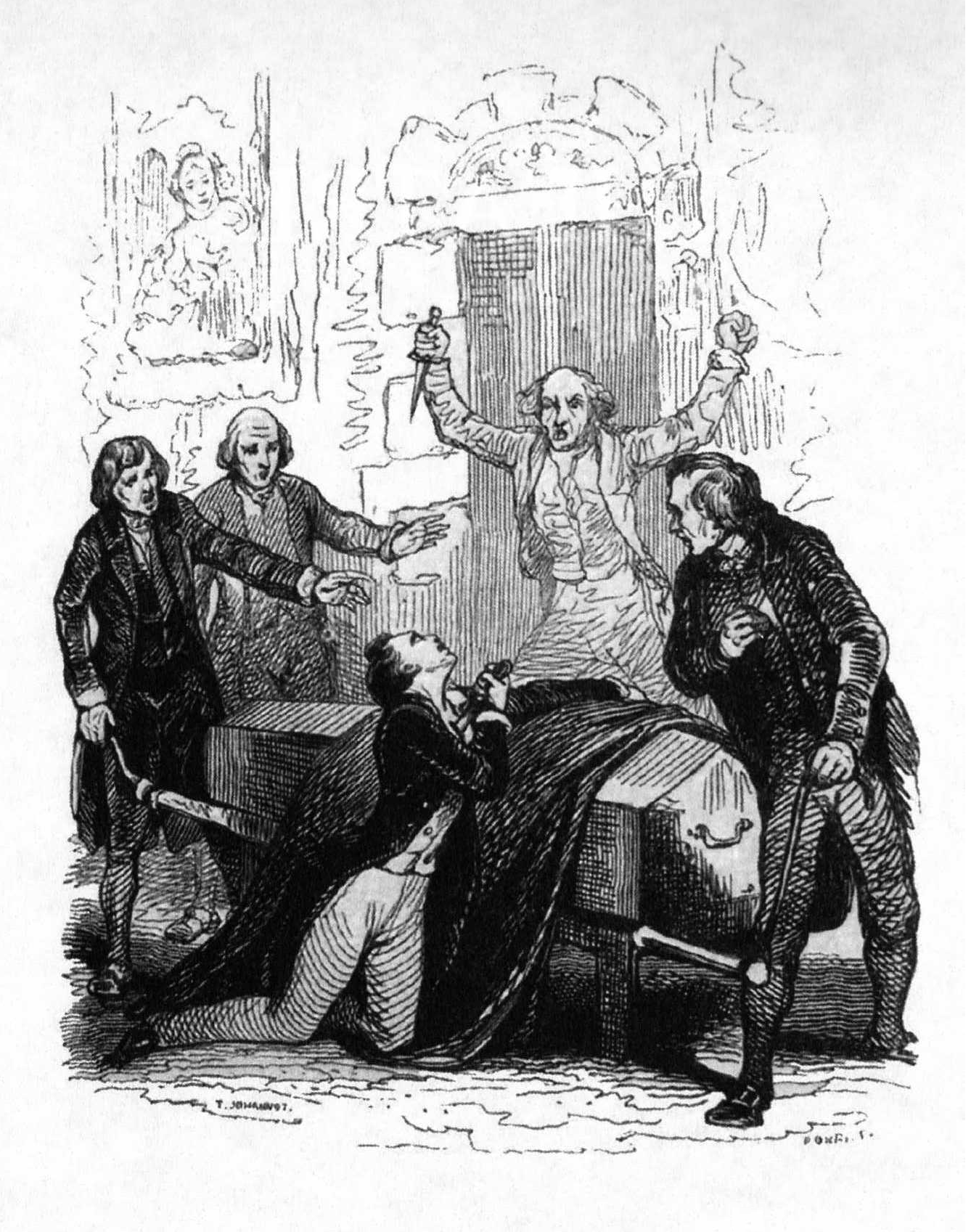 Deux destinées, drame de Xavier Forneret (1836) - frontispice représentant la scène finale